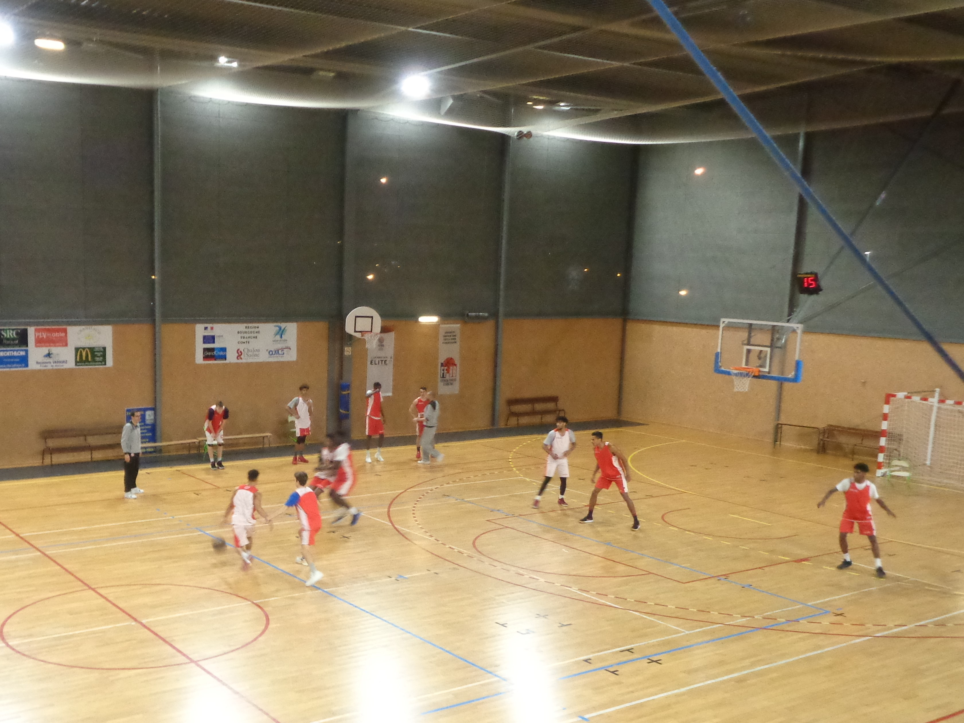 Salle Annexe du Colisée de Chalon-sur-Saône. Entrainement d'équipes de jeunes de l'Elan Chalon.